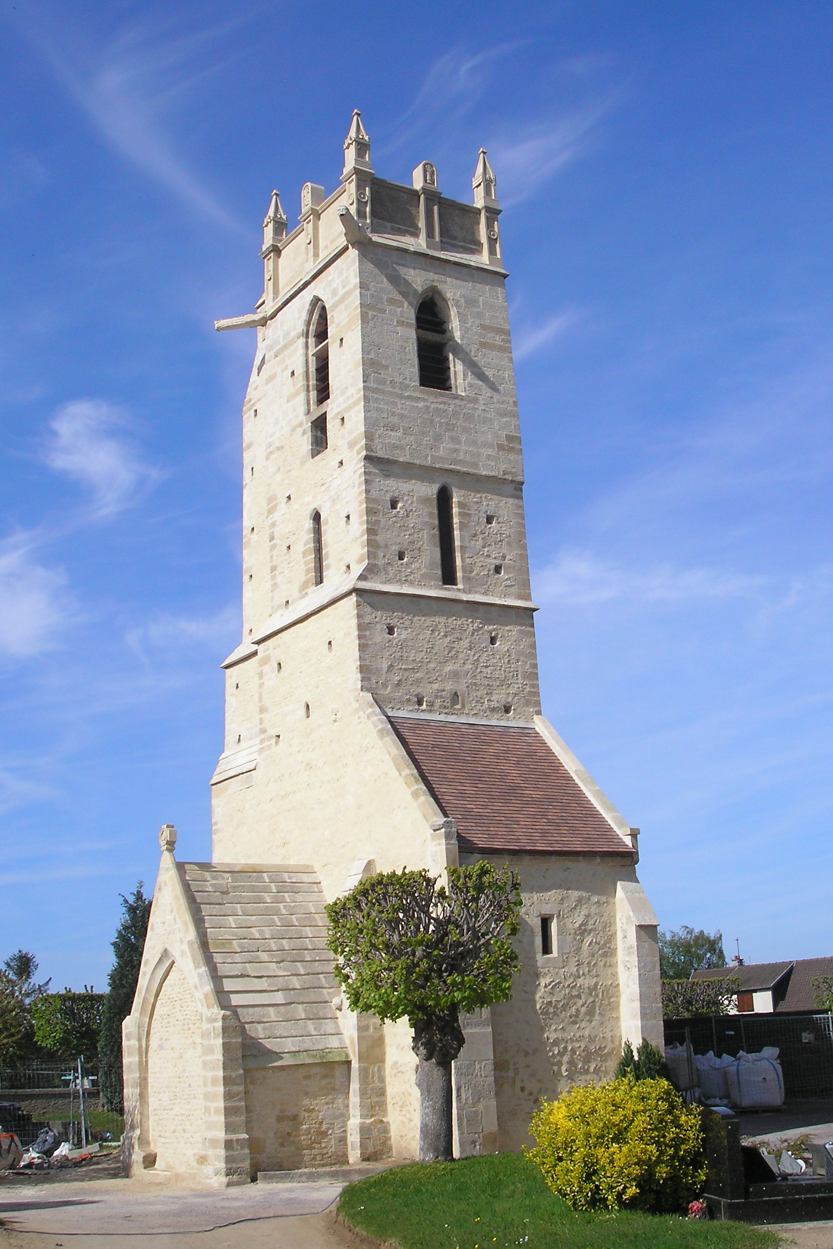 Clocher de l'église Notre-Dame de Ranville (Calvados).